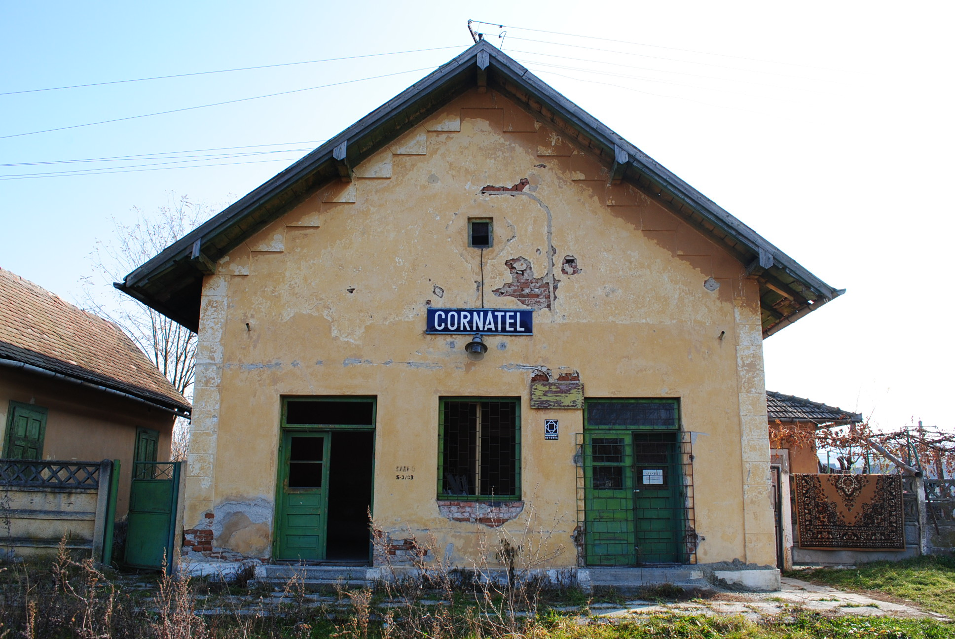 Stația Cornățel (gară, canton, district, cântar, turn de apă), 1898 - 1910 50